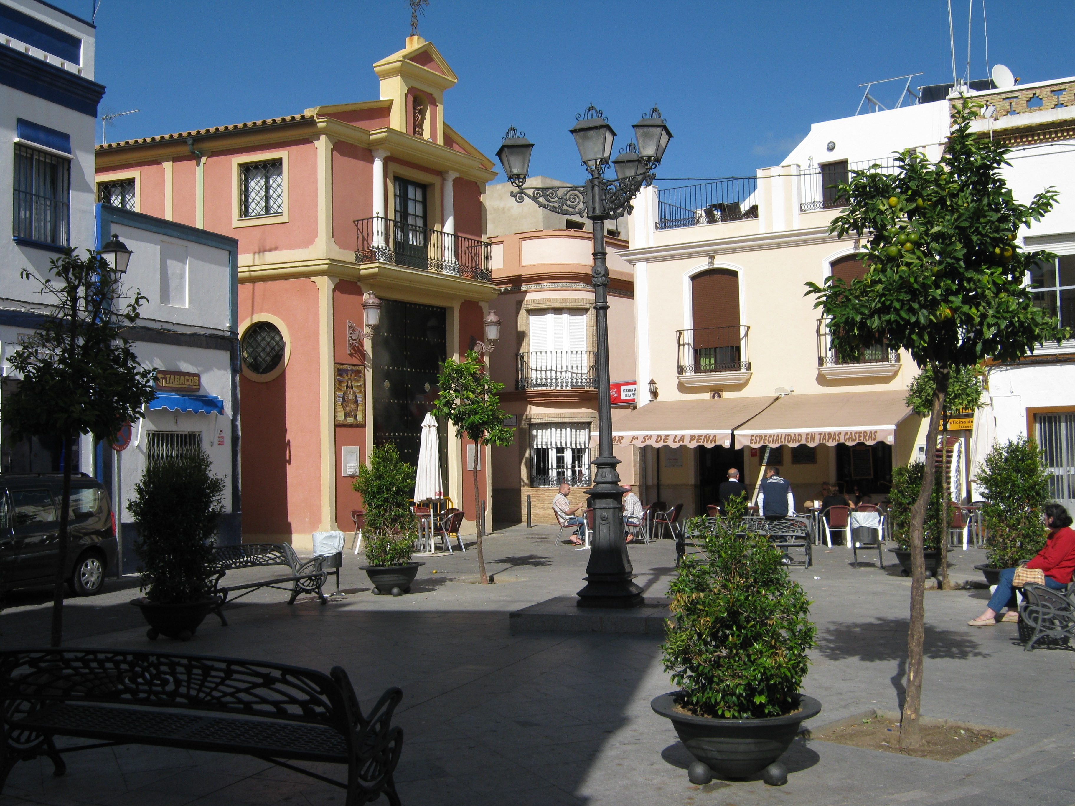 Plazoleta San Francisco de Isla Cristina, junto a la de las Flores, la más antigua de la ciudad.